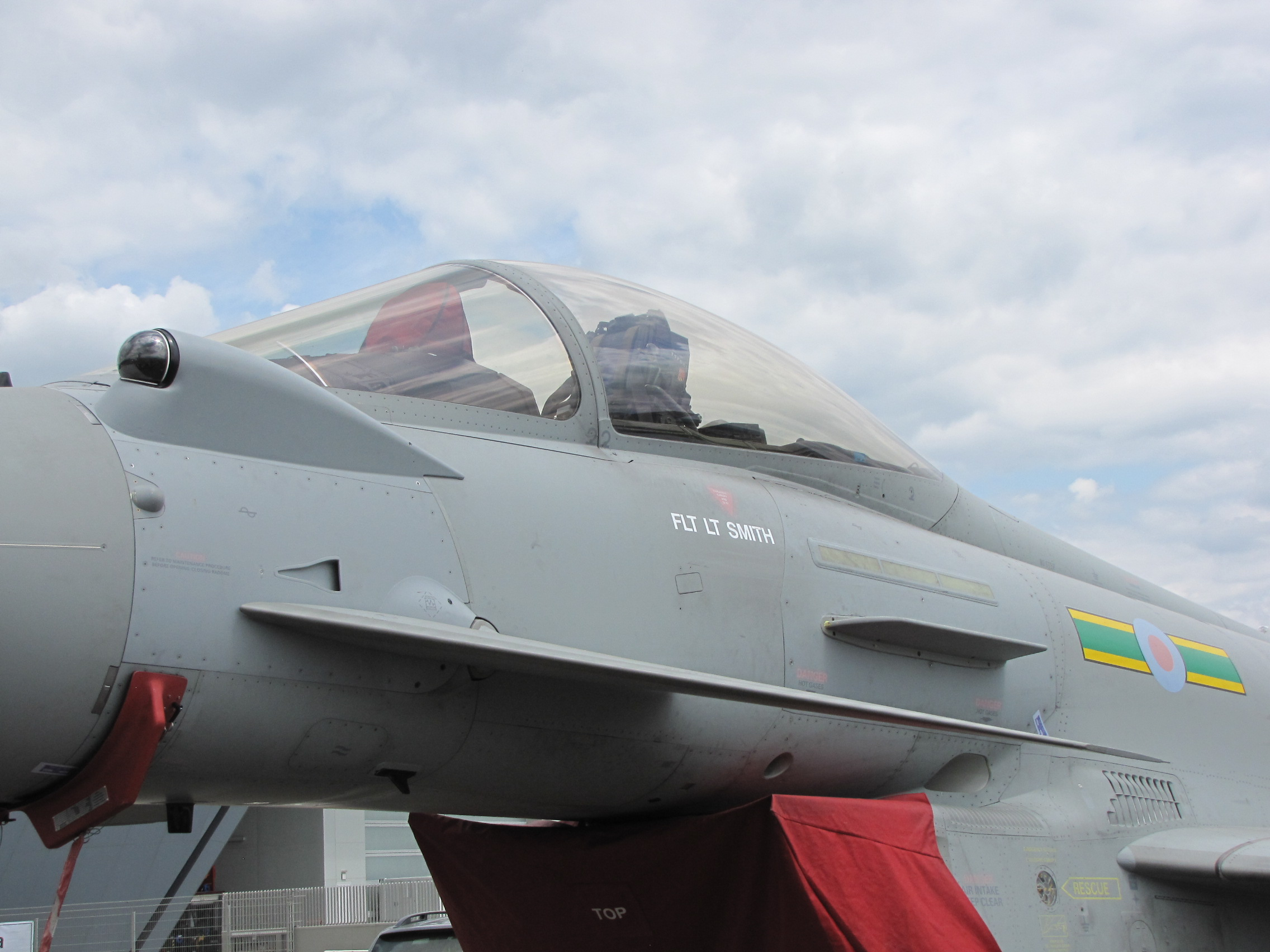 Eurofighter Typhoon az Airpower 2013 statikus során. Az Eurofighter Typhoon egy 4. generációs vadászbombázó gép. Gyártó: Eurofighter GmbH.